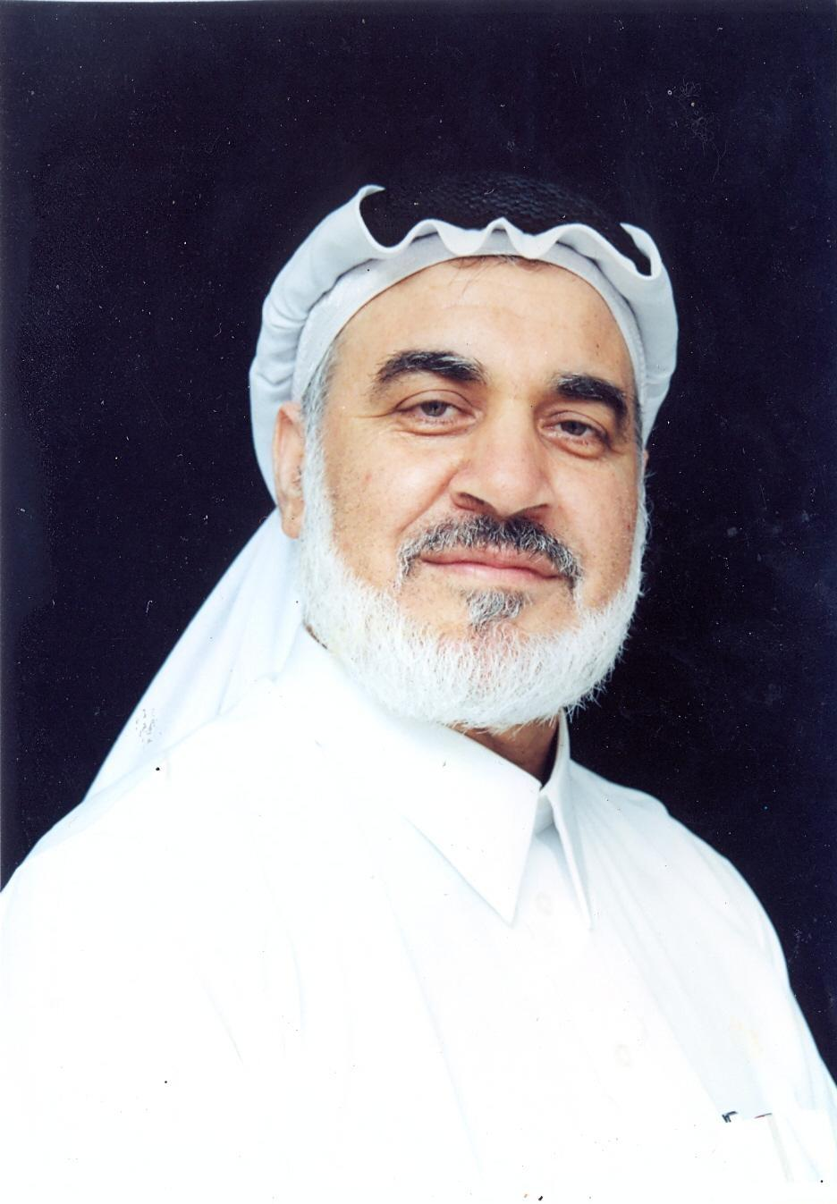 الدكتور سالم أحمد سلامة